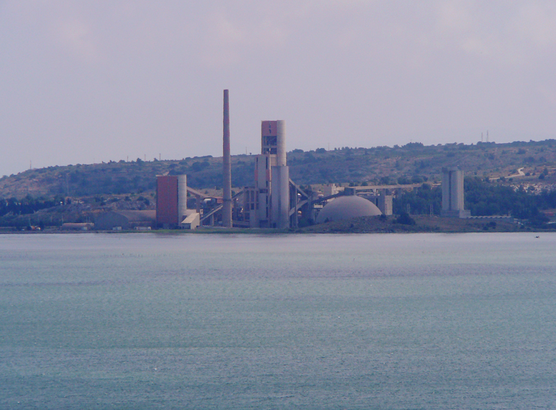 L'usine Lafarge à Port-la-Nouvelle depuis l'île de Sainte-Lucie (photo personnelle)